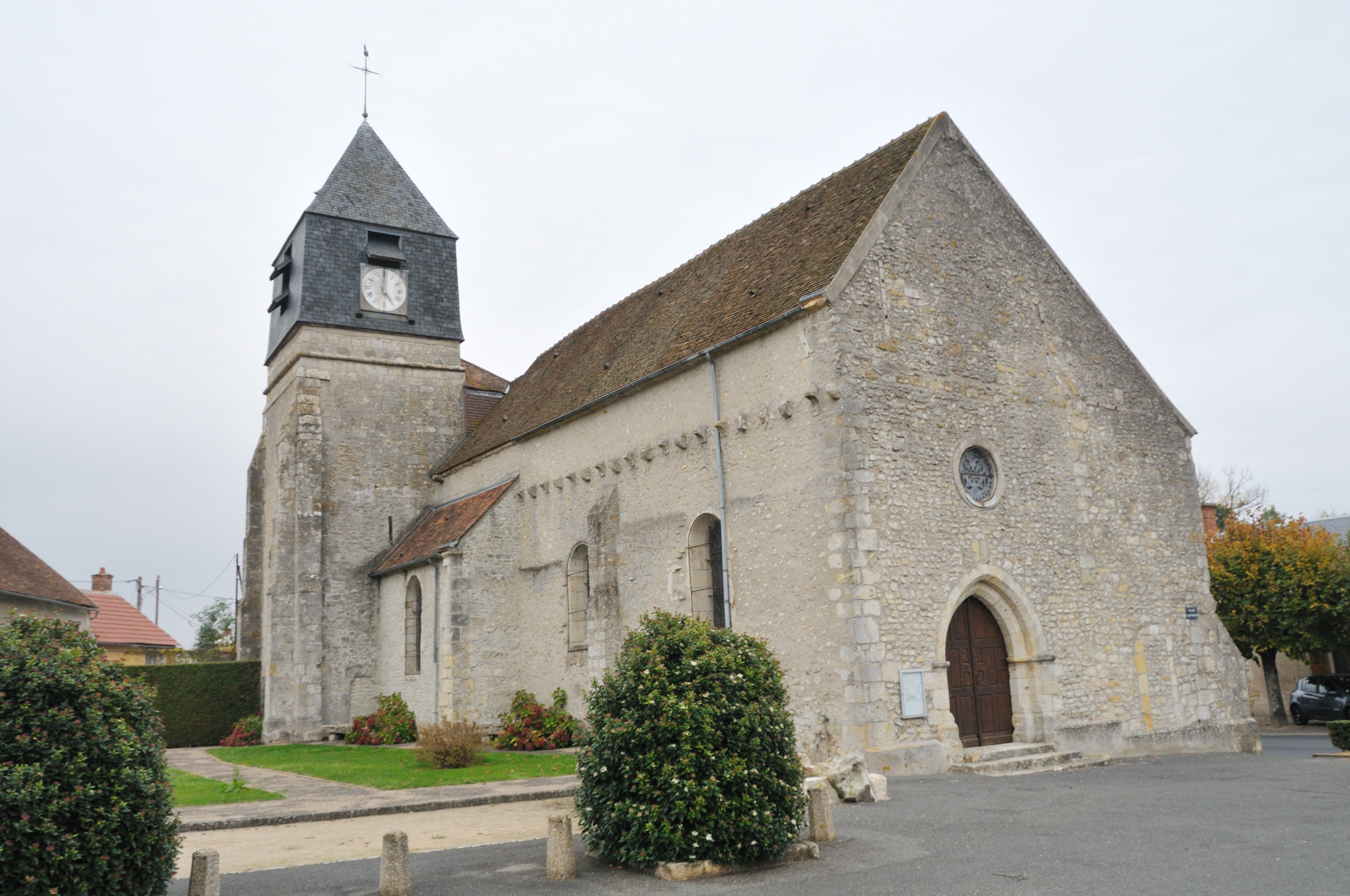 Église Saint-Martin d'Aulnay-la-Rivière, Loiret, France